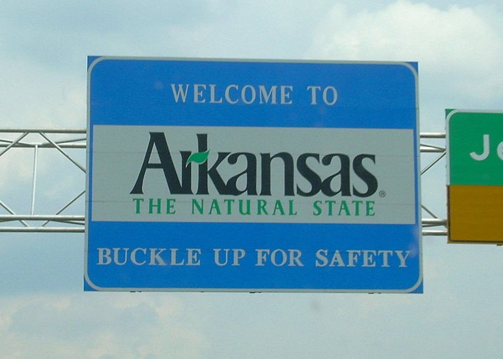 Arkansas state welcome sign